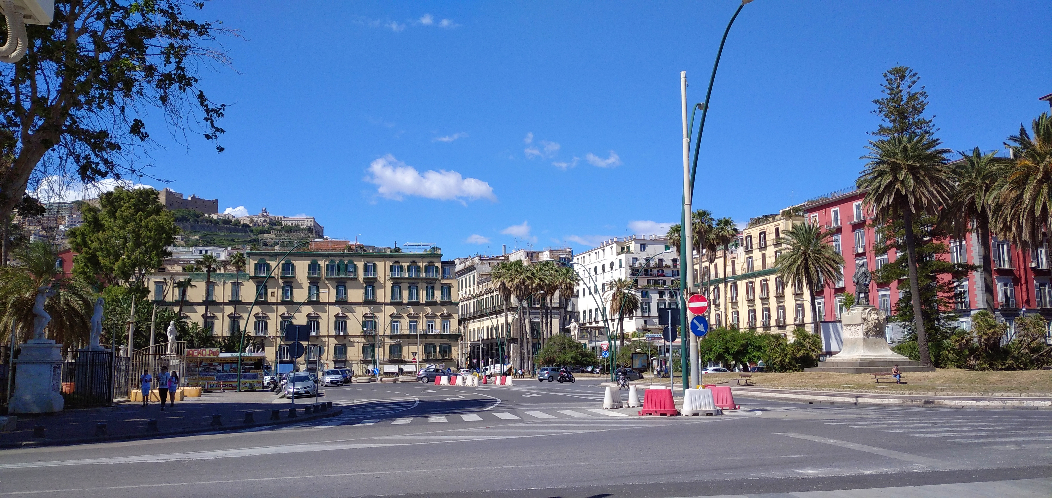 p. Vittoria